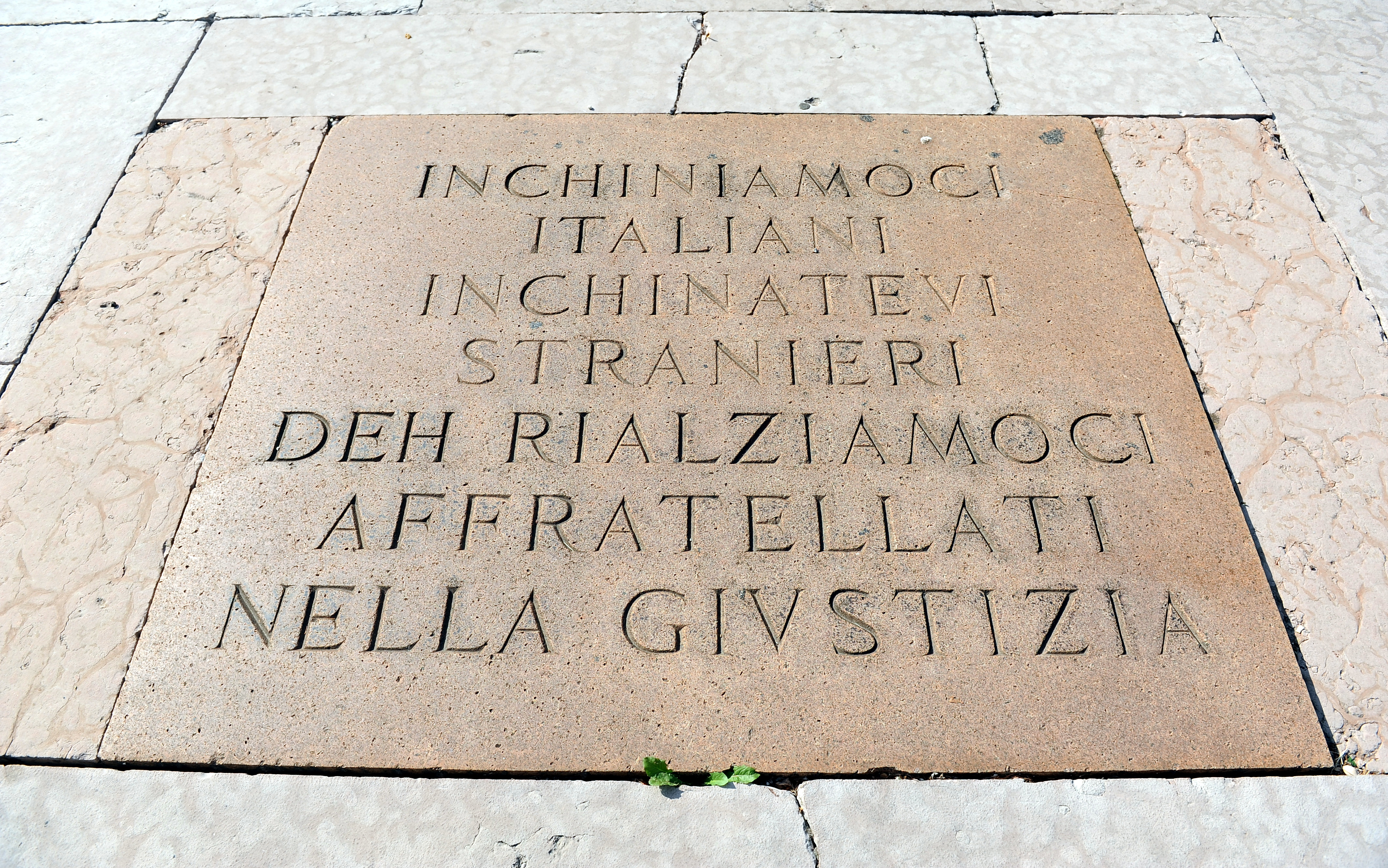 Monumento a Dante Alighieri. Epigrafe dettata da Guglielmo Ranzi. This is a photo of a monument which is part of cultural heritage of Italy.